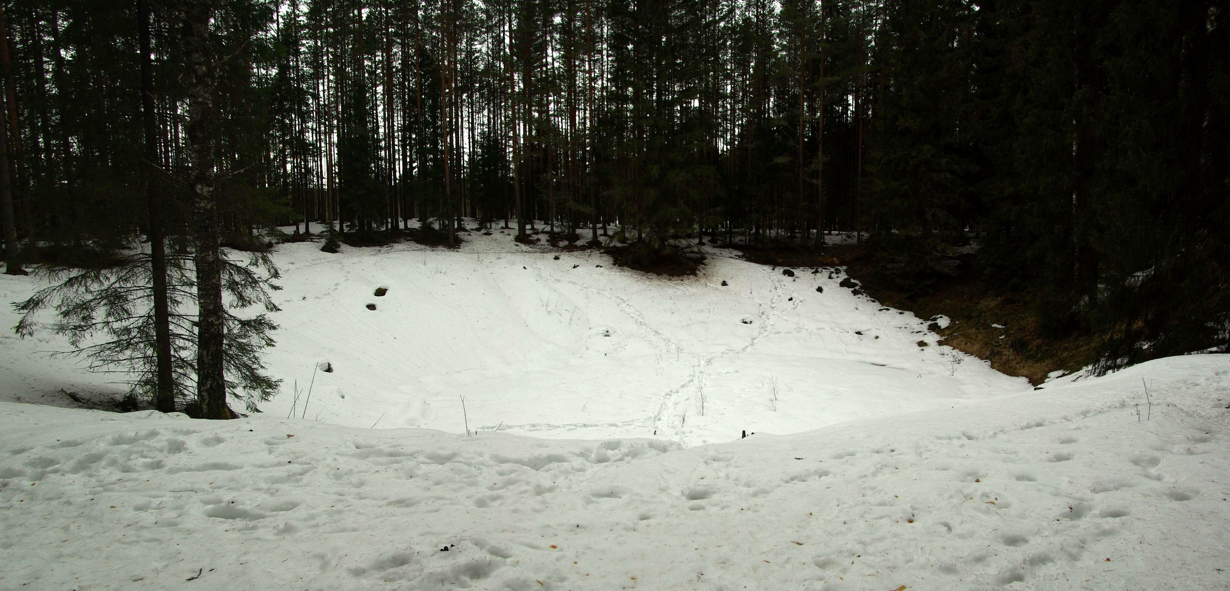 Ilumetsa meteoriidikraatrid on meteoriidikraatrid Põlva maakonnas Veriora vallas.